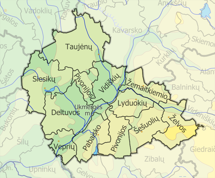 Padaryta iš :image:LietuvosSeniunijos.png